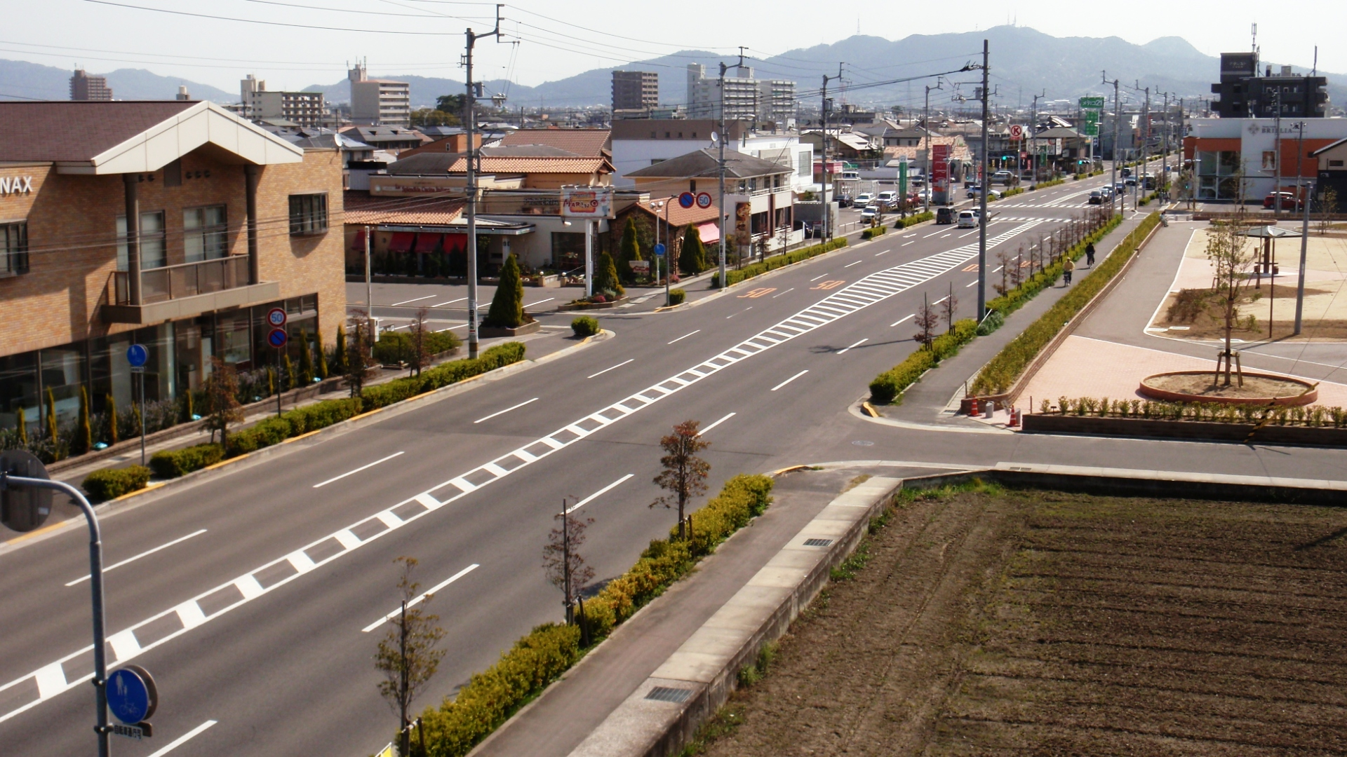 香川県高松市の市道木太鬼無線。松縄町の木太町との境付近。